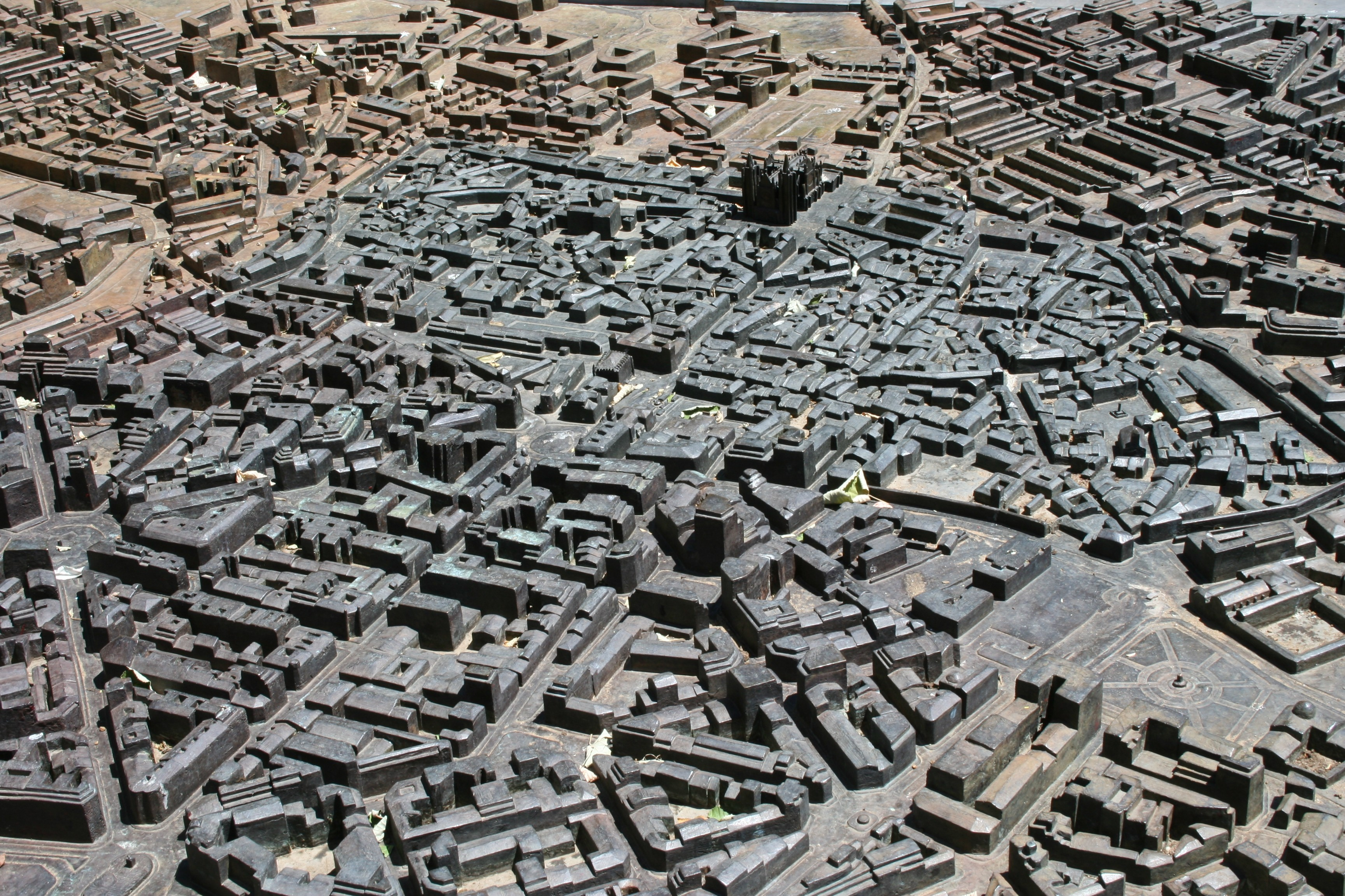 Maqueta de León frente a la casa Botines